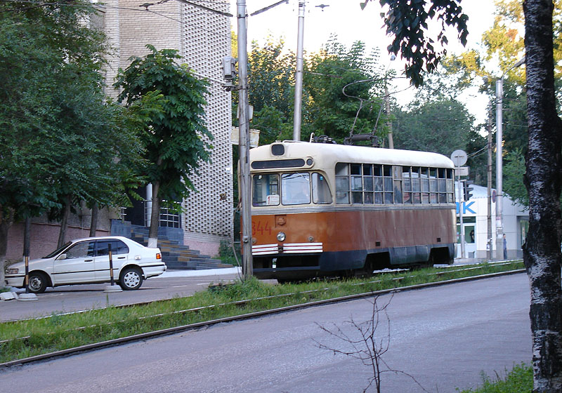 RVZ tram in Khabarovsk, Russia